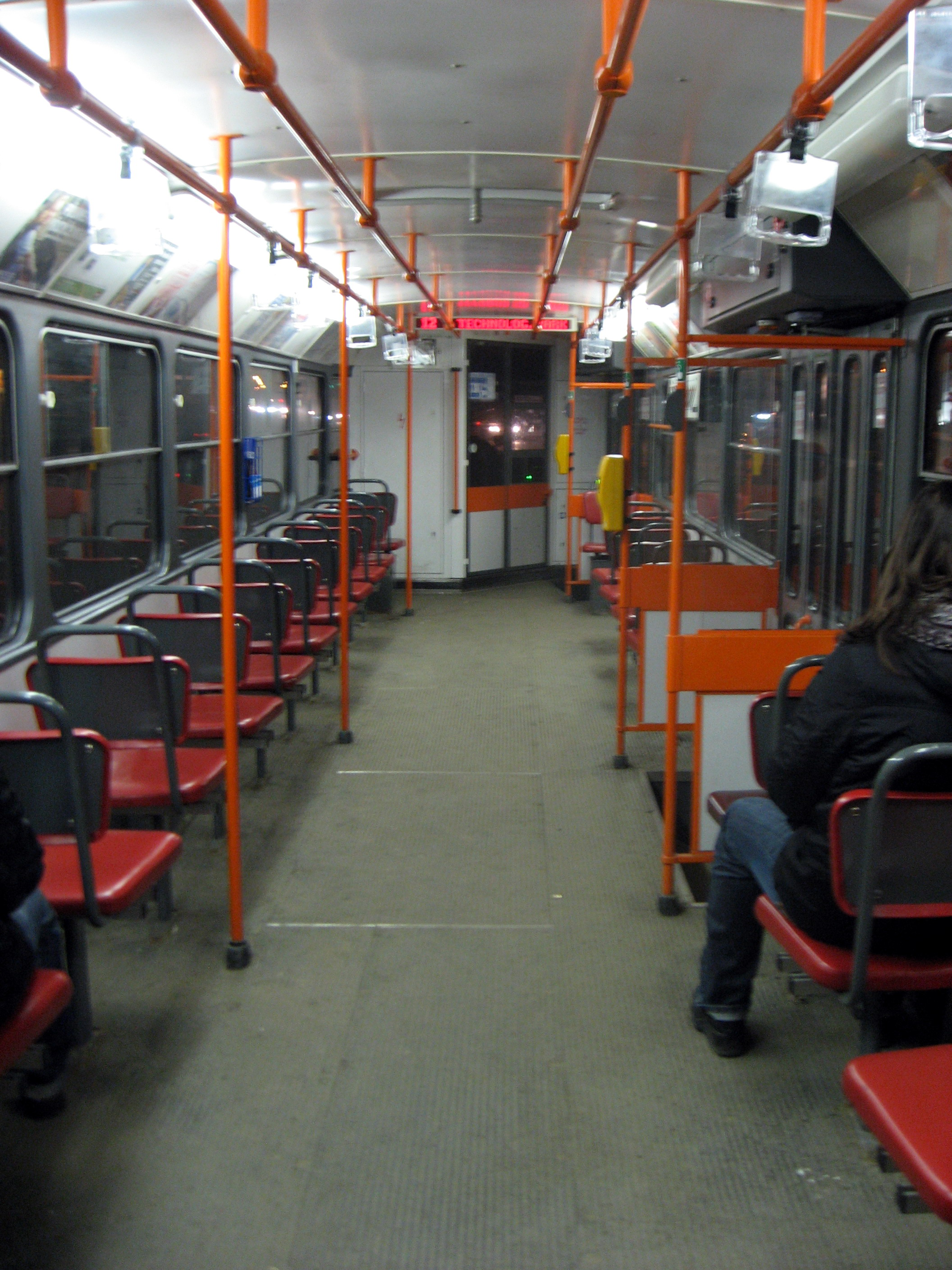 Interiér vozu Tatra T3RF